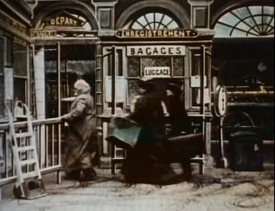 Méliès, Le voyage a travers l'impossible1904 colorizée 06